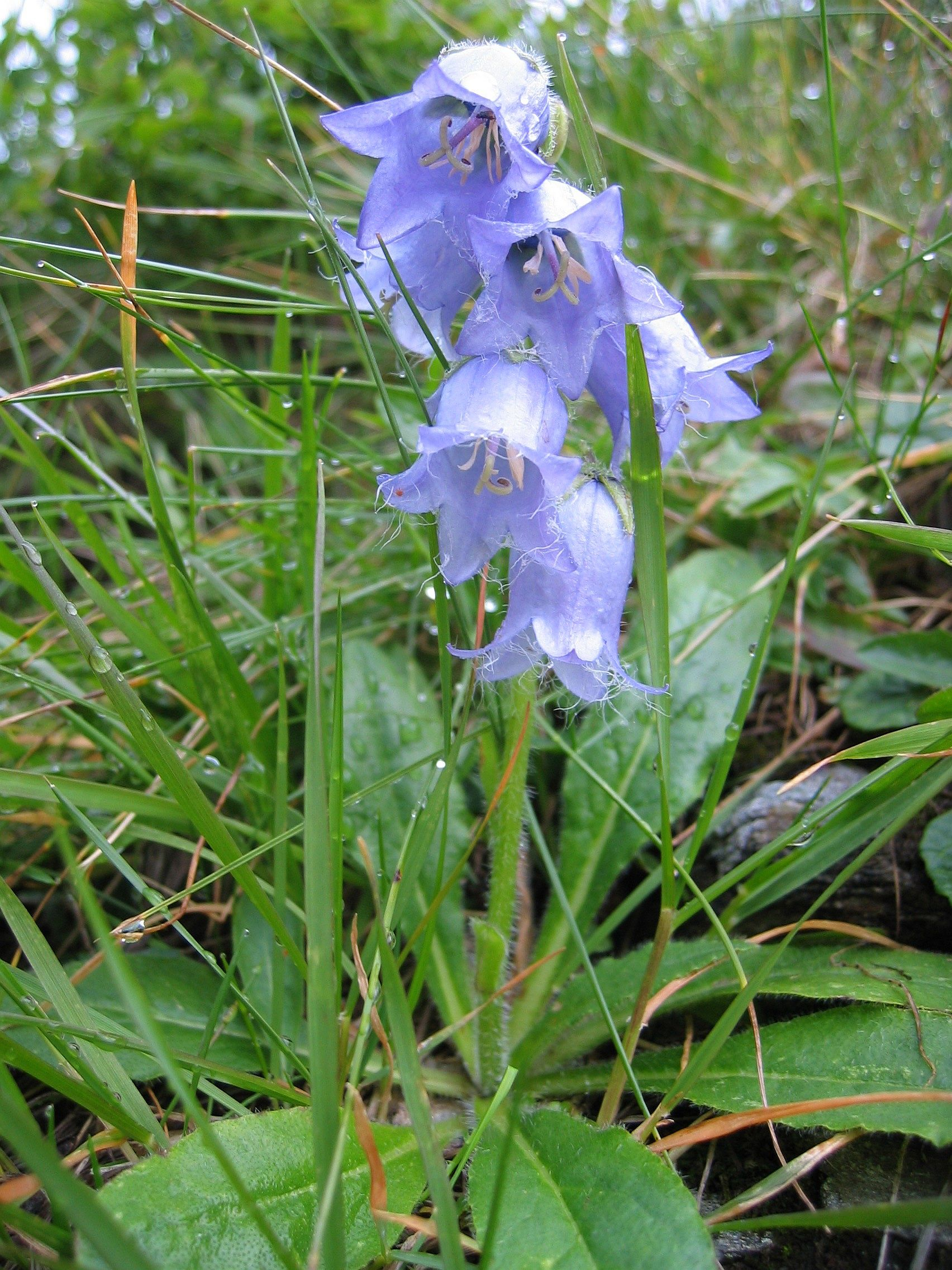 Campanula barbata, Giglachsee, Styria, Austria